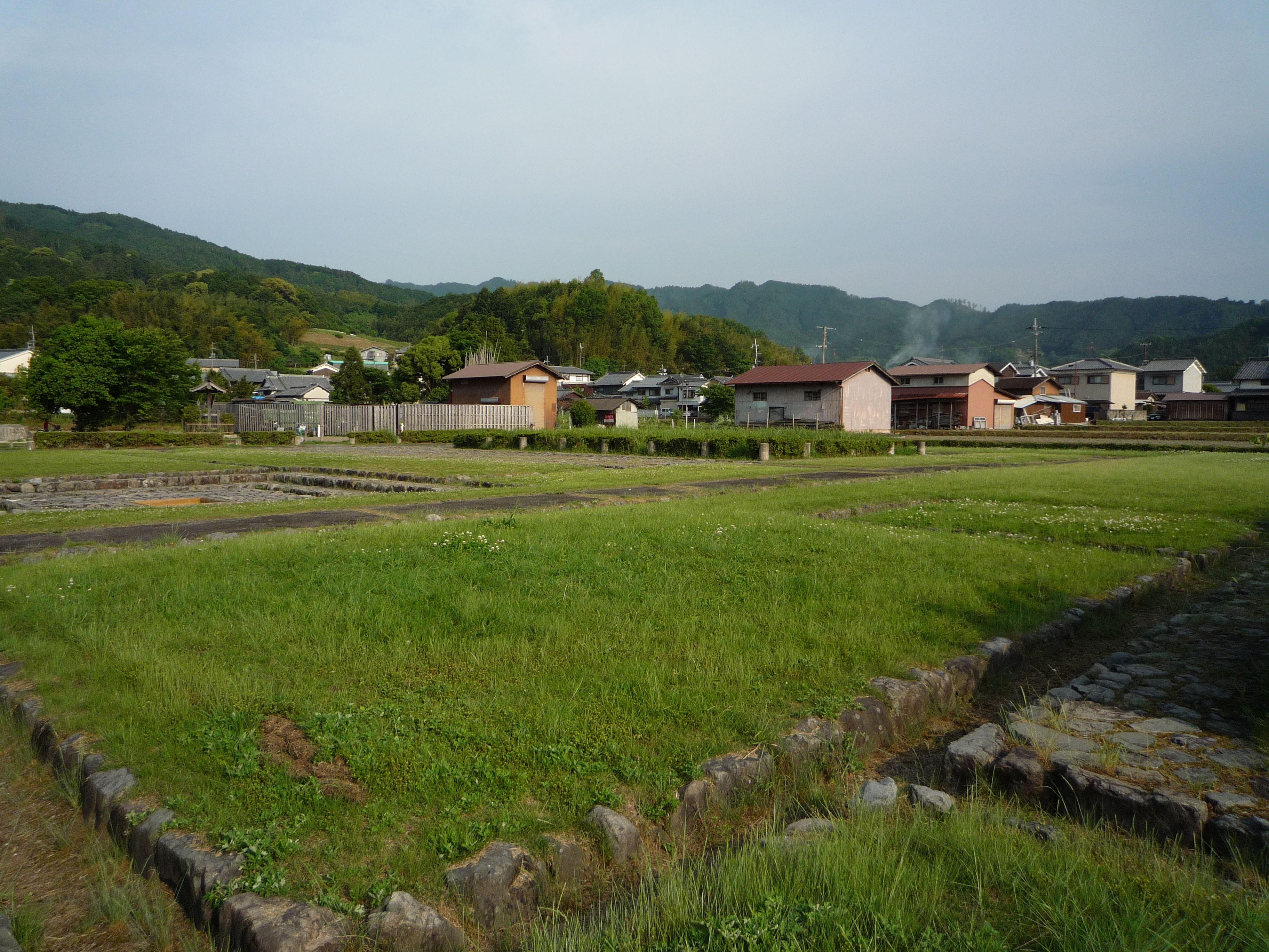 奈良県明日香村 板蓋宮